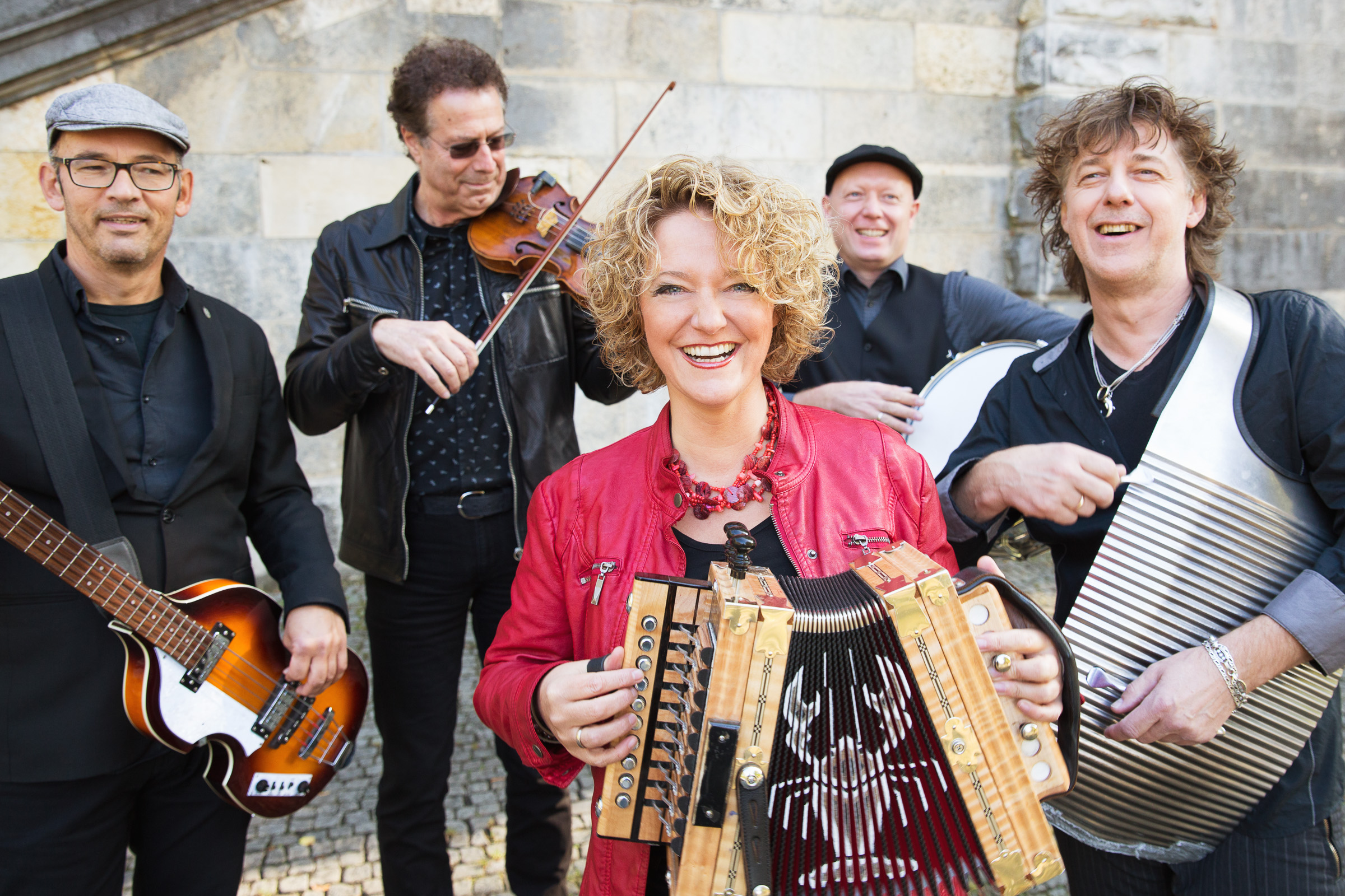 Offizielles Pressebild aus dem Jahr 2019 mit Marco Piludu, Helt Oncale, Anja Baldauf, Stefan Baldauf und Frederic Berger